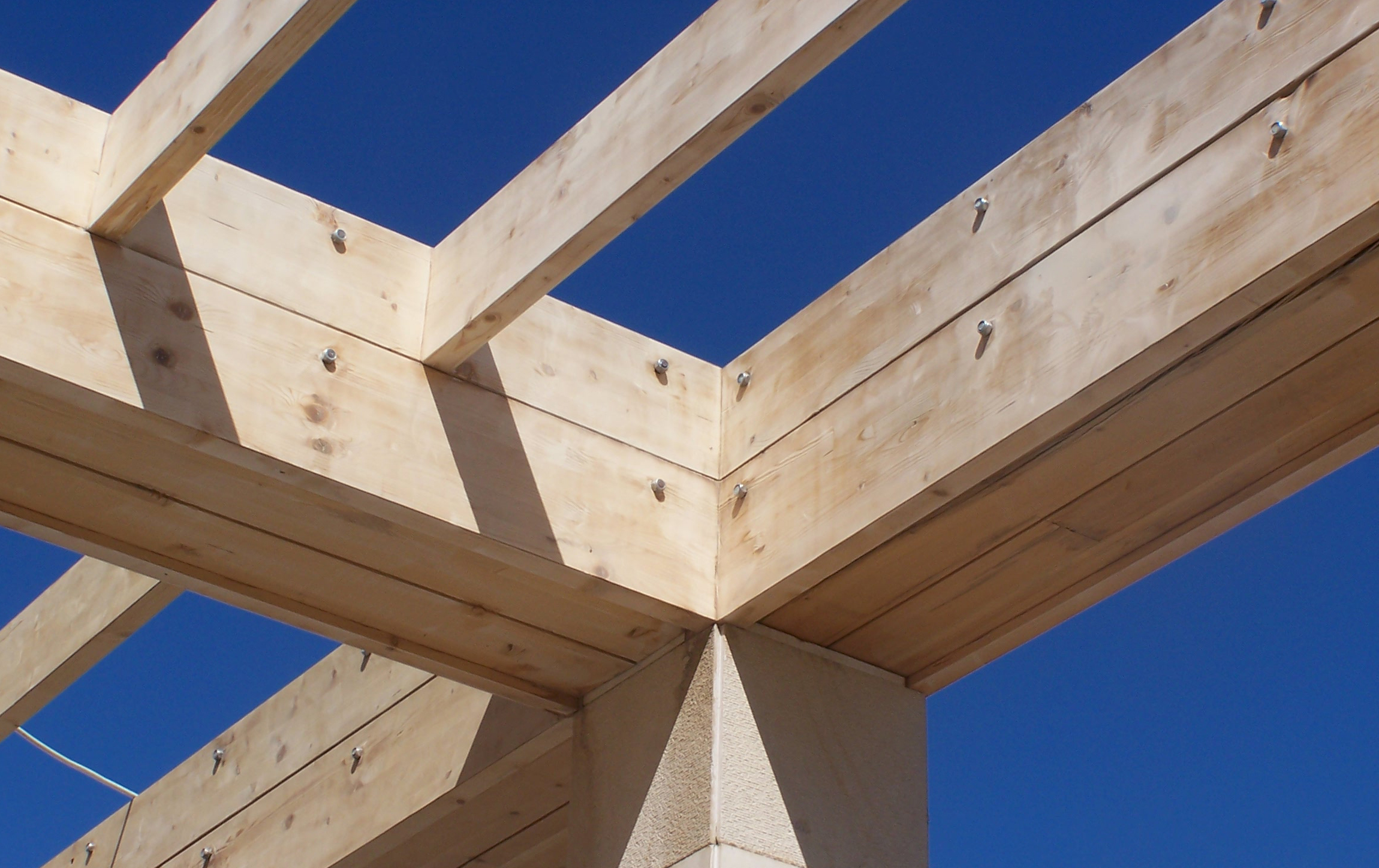 Lamine ahsap kirisler